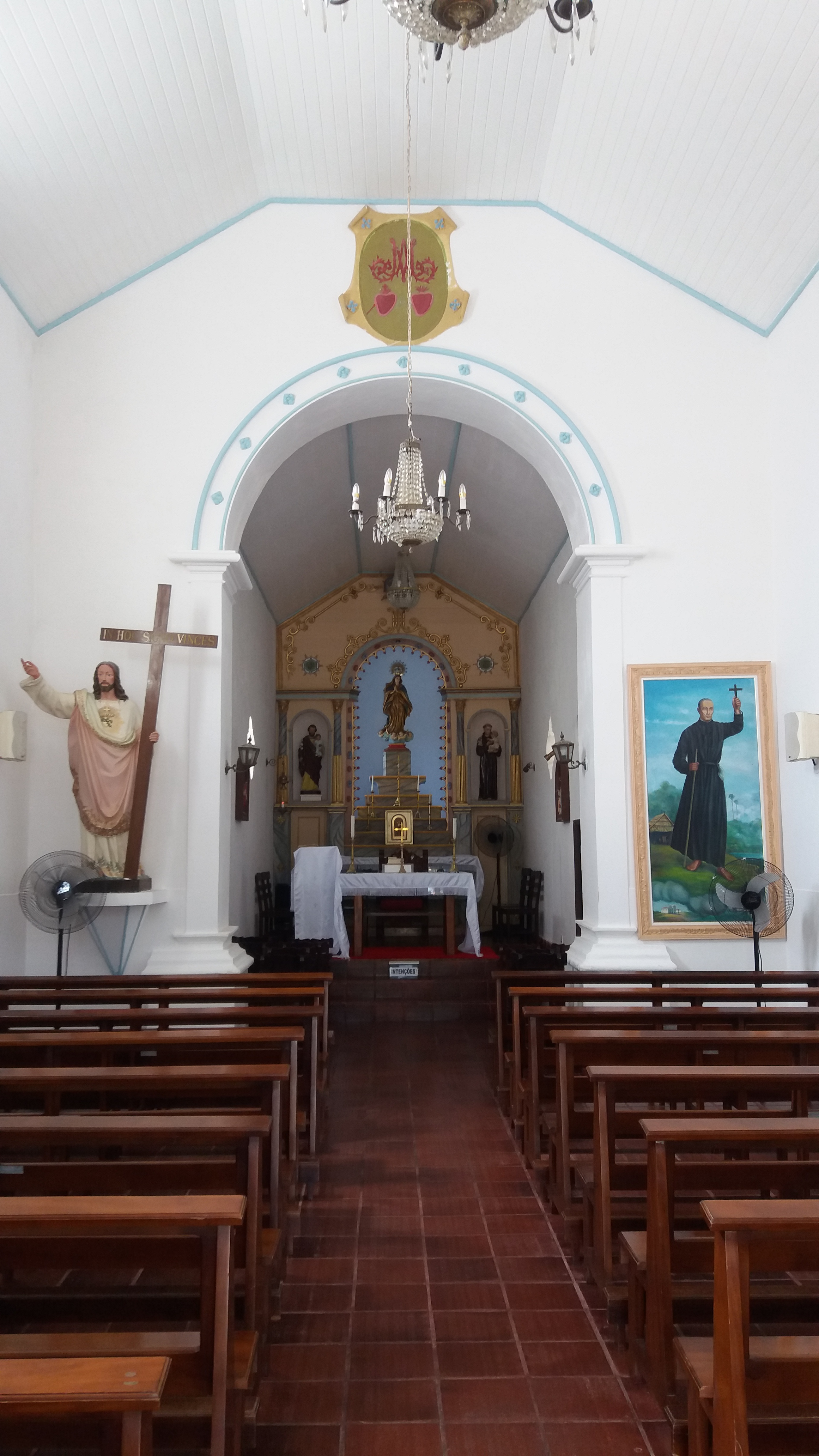 Português do Brasil: Altar mor da antiga matriz de Guarapari - Es